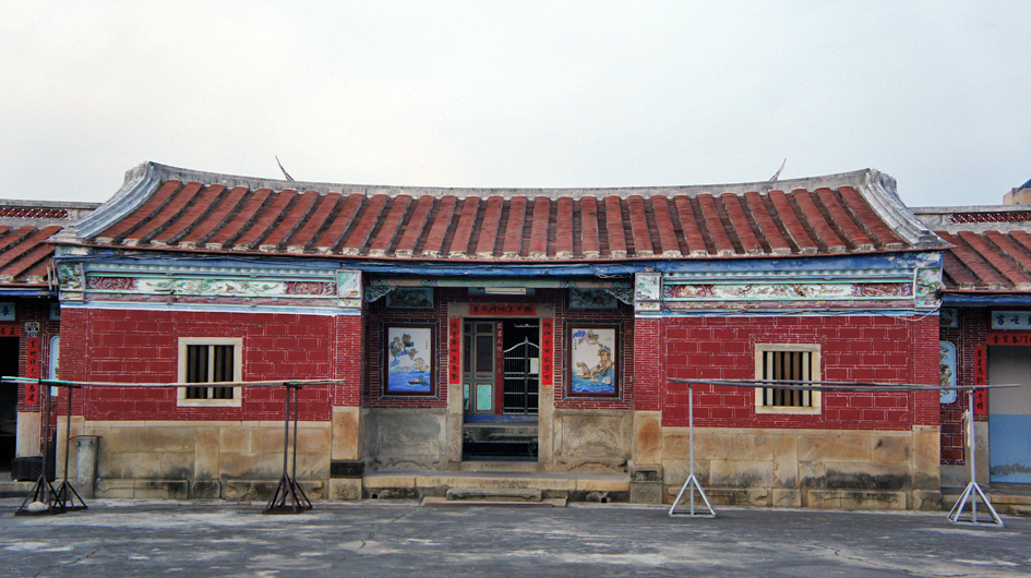 中文（台灣）: 豐原張家萬選居。